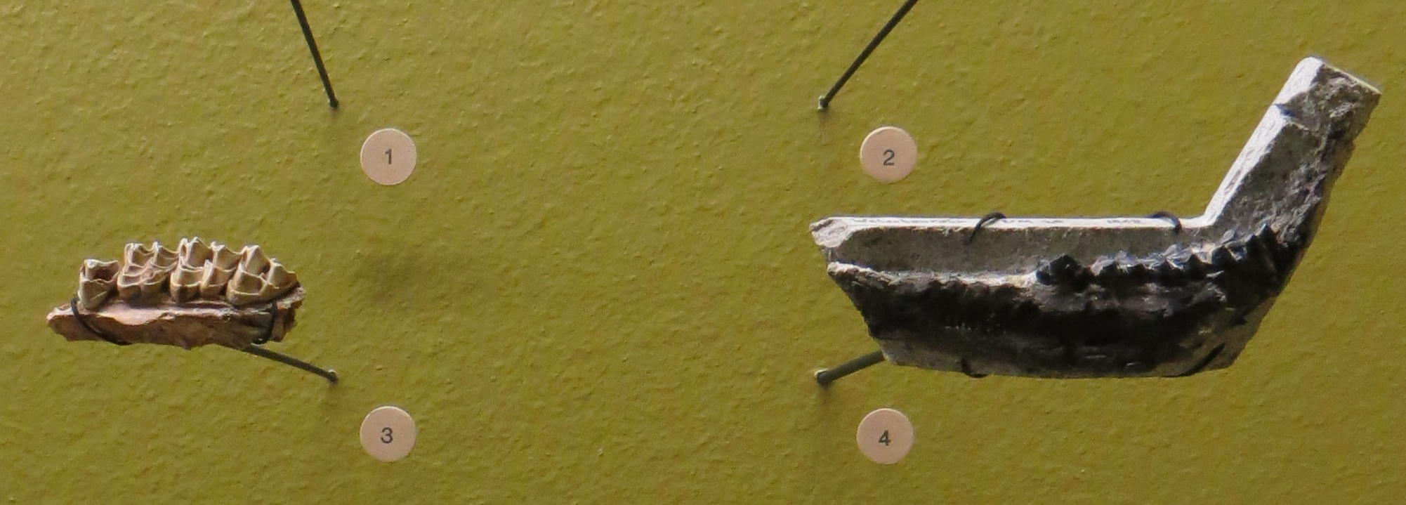 Fossil of Lophiomeryx - Took the picture at Natural History Museum, Basel